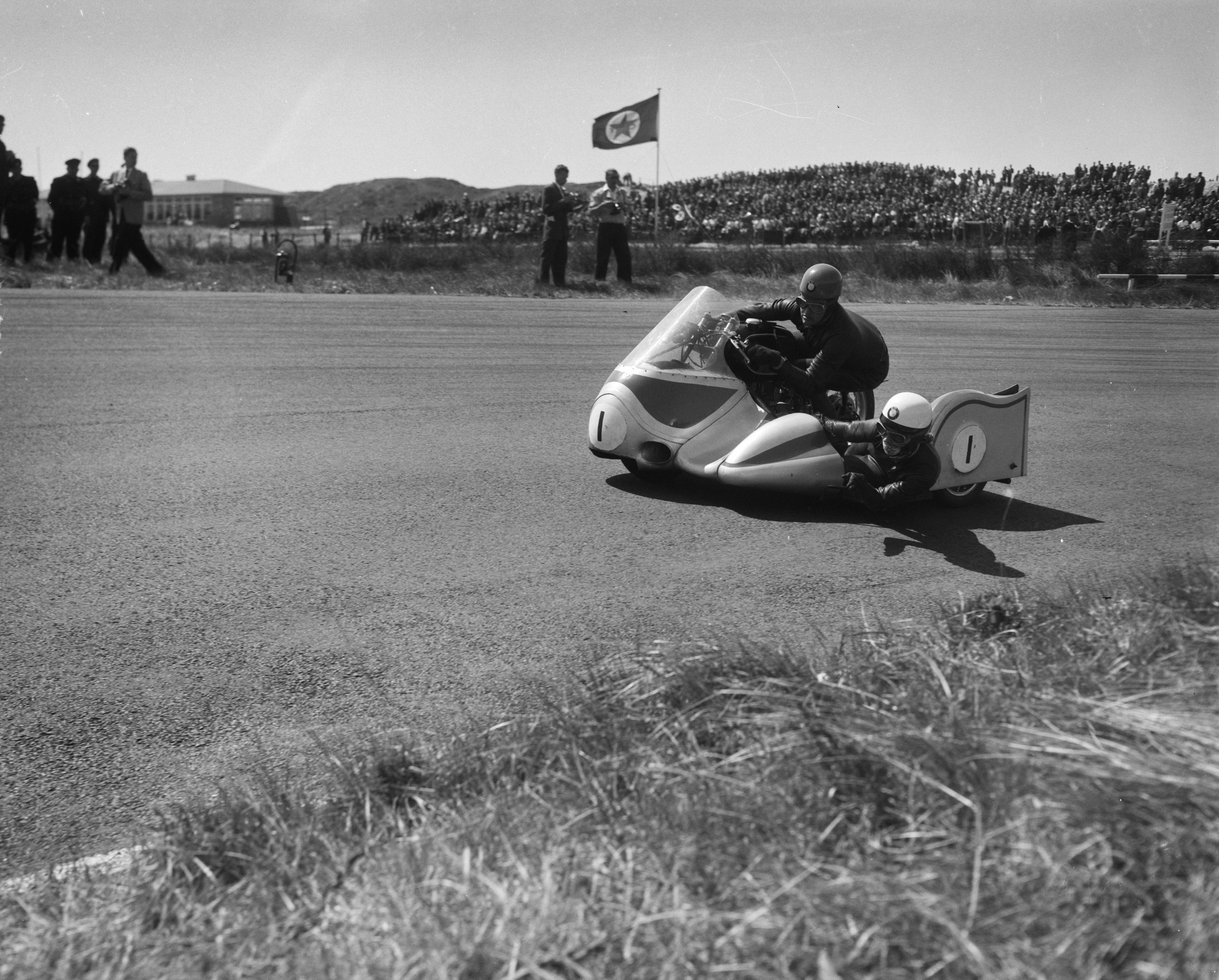 Collectie / Archief : Fotocollectie Anefo Reportage / Serie : [ onbekend ] Beschrijving : Zijspanrace Zandvoort. Jaccies Drion ( Ingeberg Stoll ) (Frankrijk) Datum : 27 mei 1956 Locatie : Frankrijk, Zandvoort Fotograaf : Bilsen, Joop van / Anefo Auteursrechthebbende : Nationaal Archief Materiaalsoort : Negatief (zwart/wit) Nummer archiefinventaris : bekijk toegang 2.24.01.04 Bestanddeelnummer : 907-7839